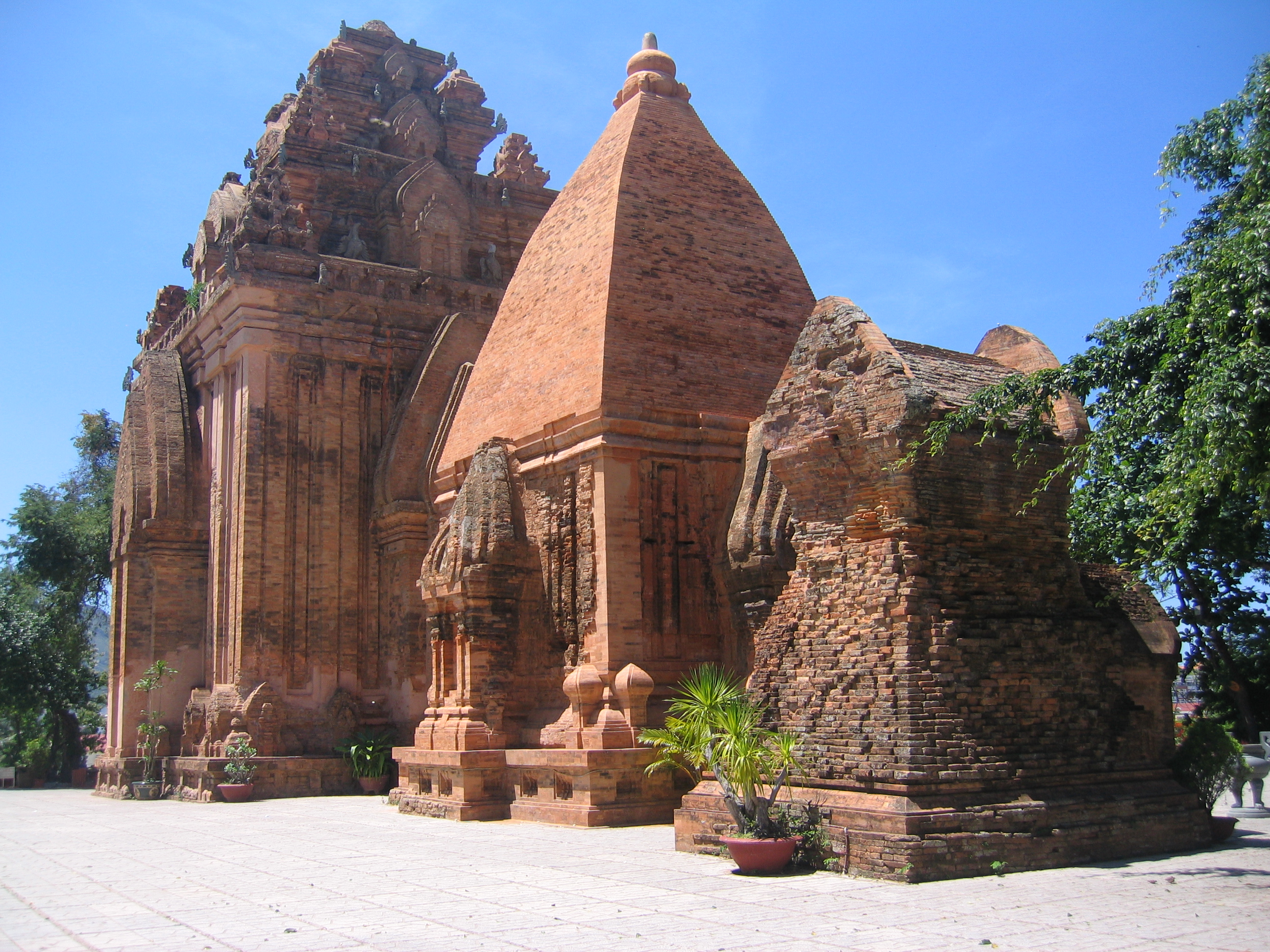 Po Nagar